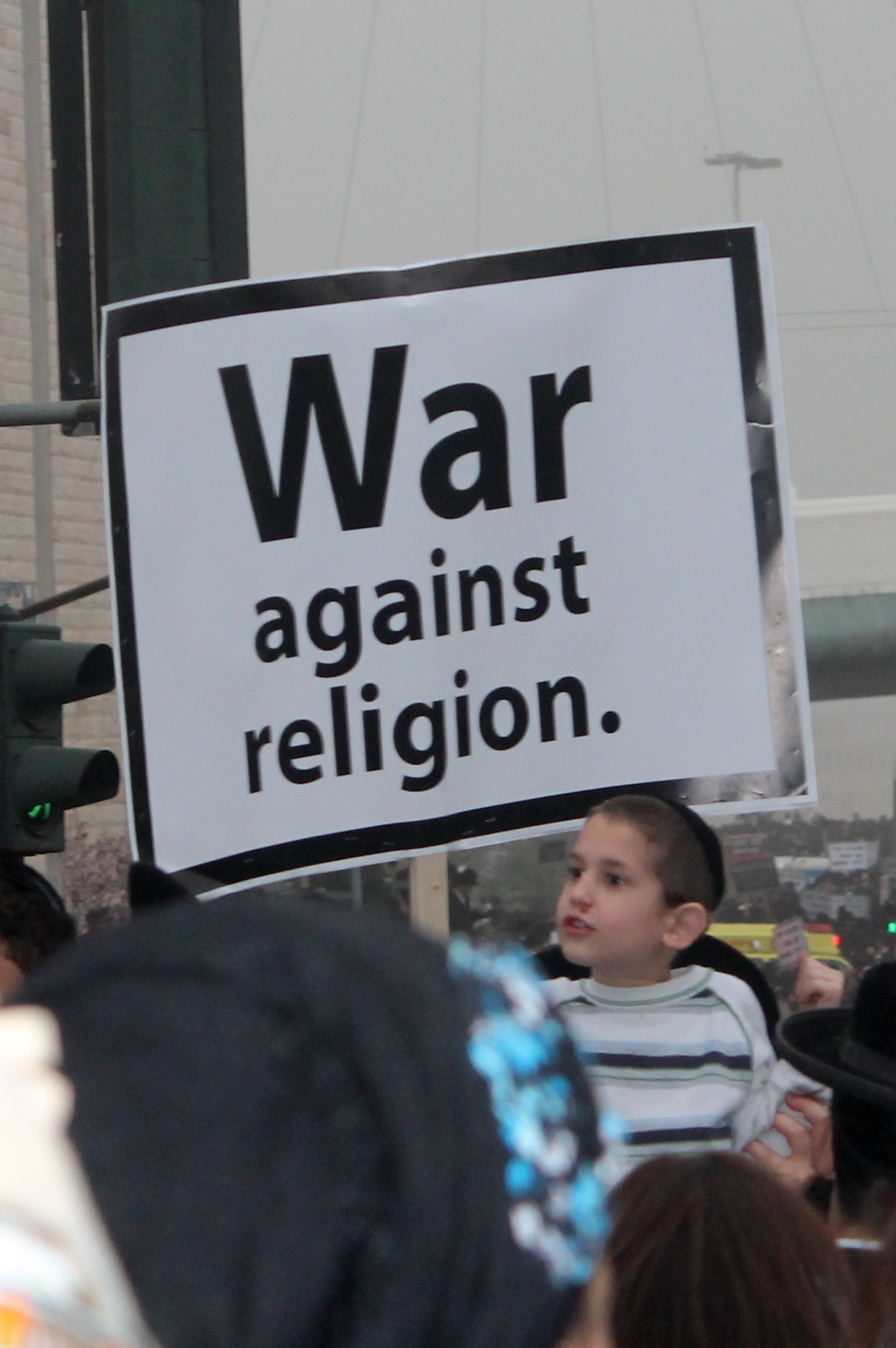 עצרת נגד הגיוס